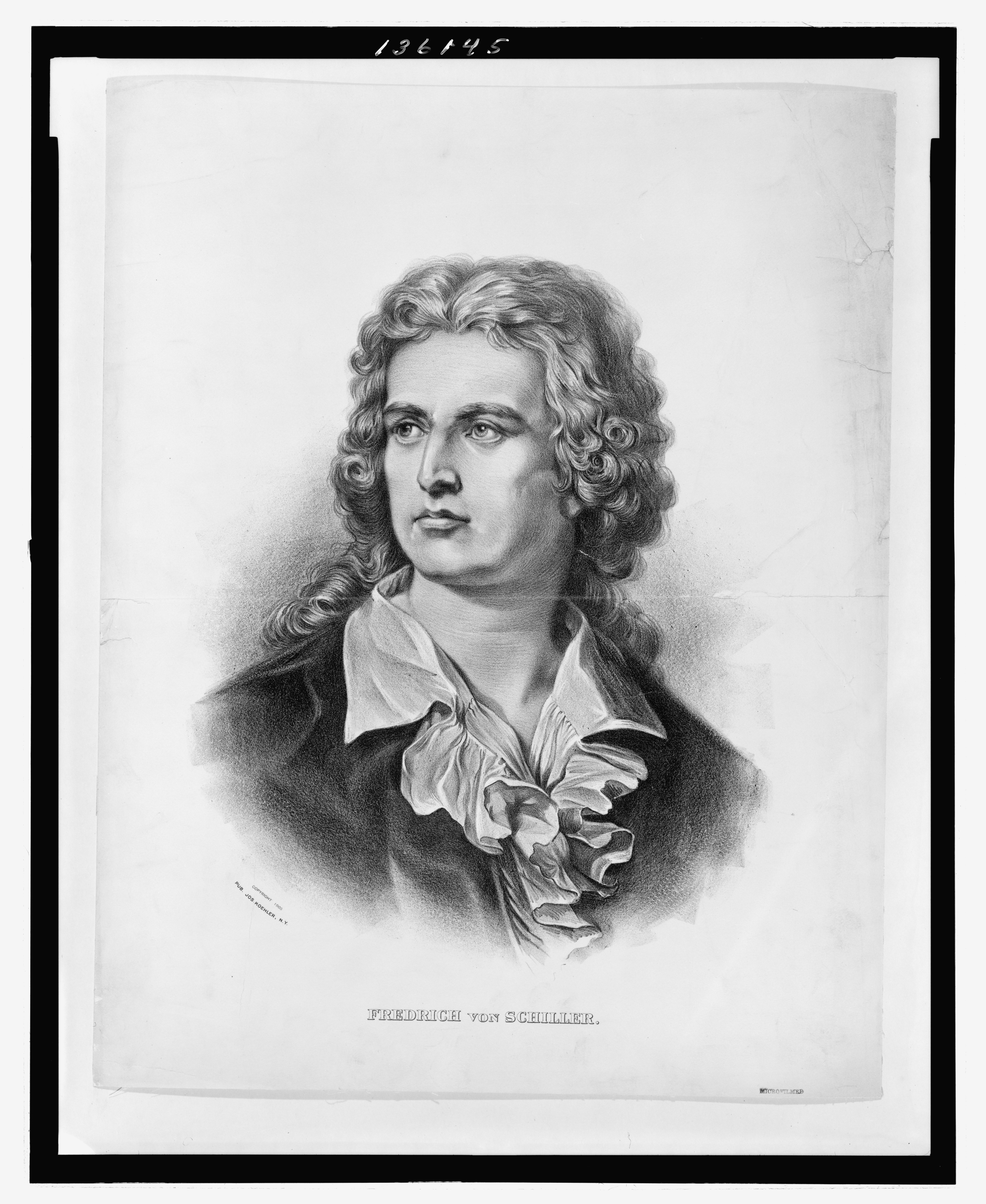 "Fredrich von Schiller", lithograph